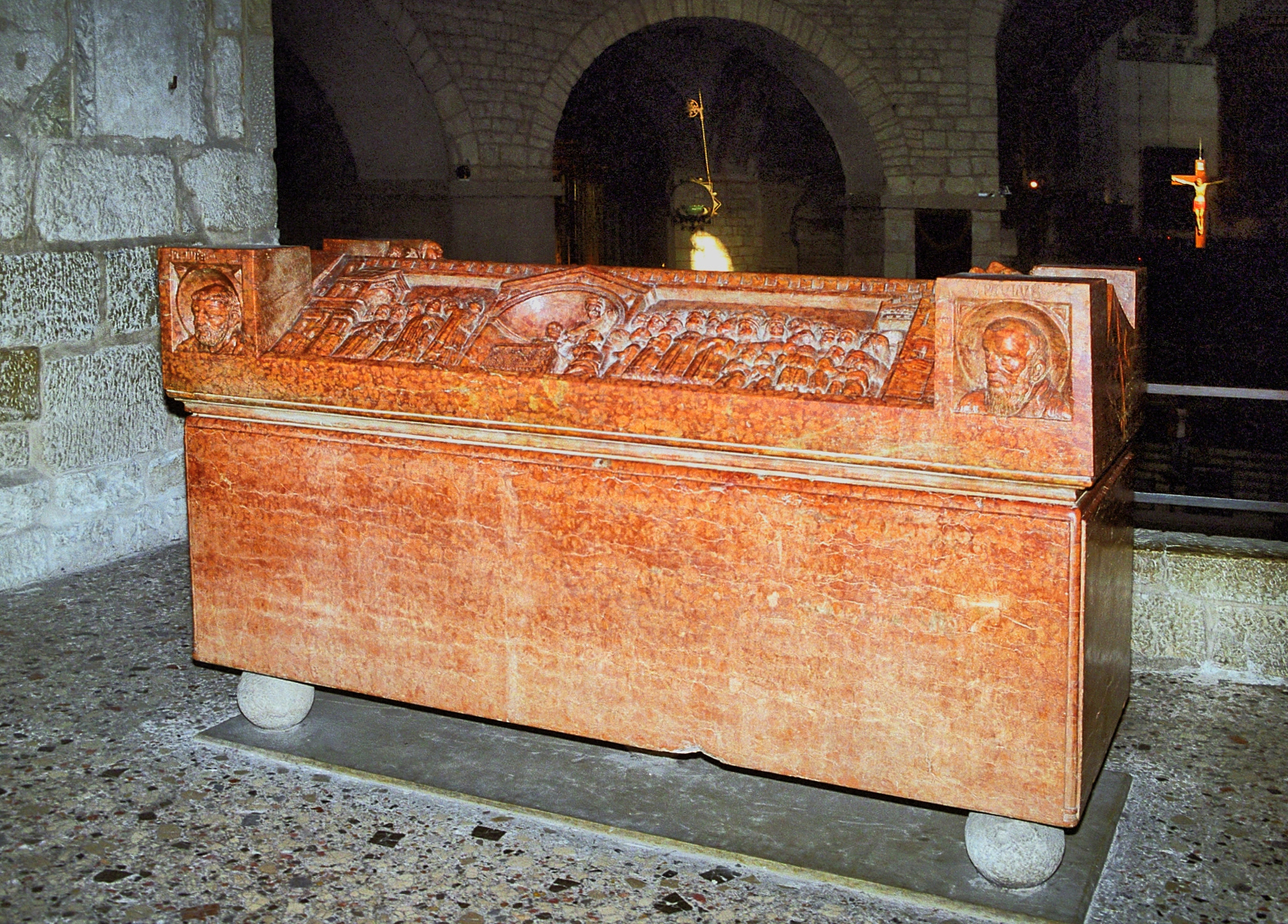 Italie - Lombardie - Brescia - Rotonda - Sarcophage de l'évêque Berardo Maggi